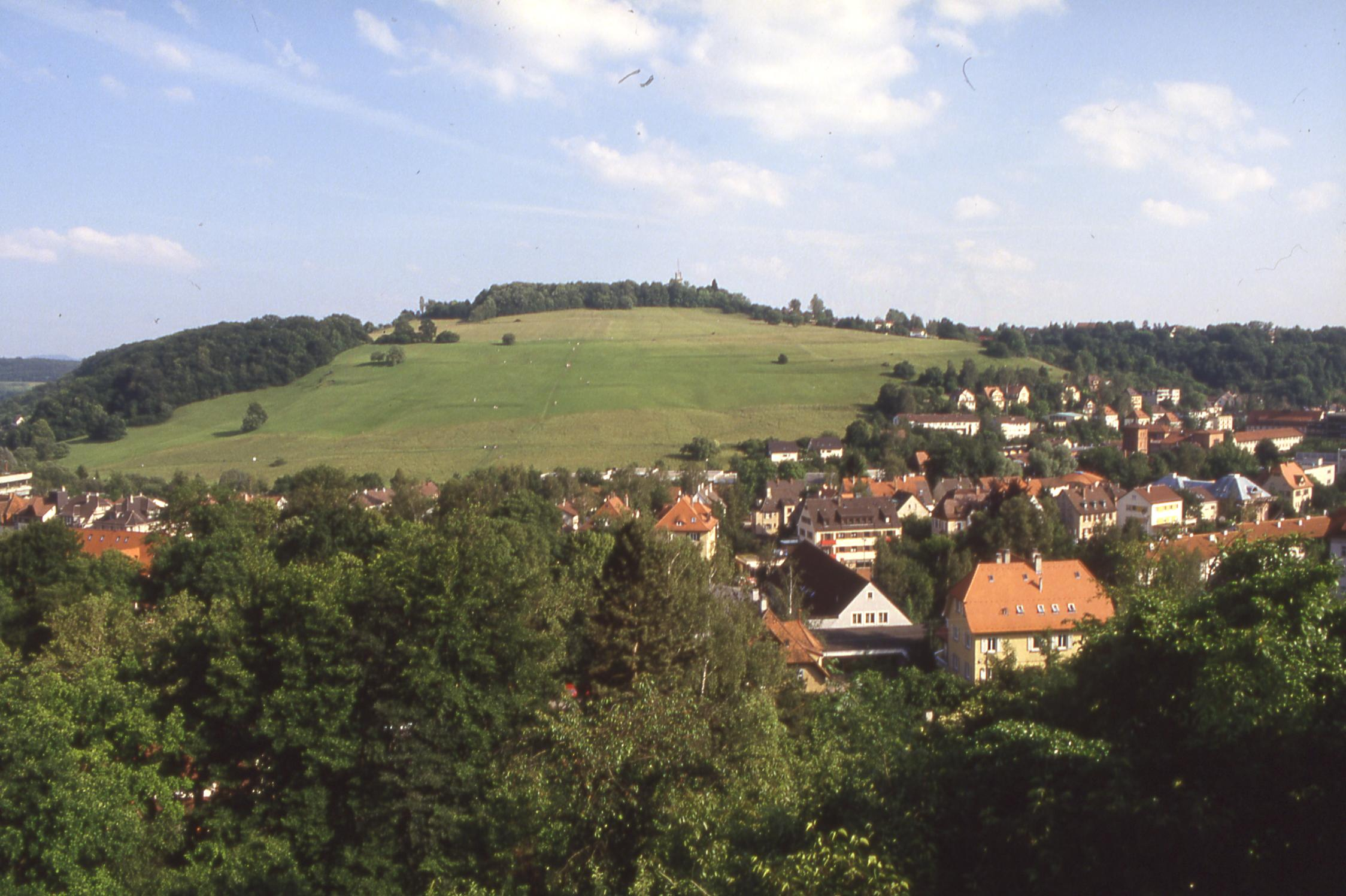 Der Nordhang des Österbergs in Tübingen. Wegen des labilen geologischen Untergrunds (Knollenmergel) ist der Hang nicht bebaut, obwohl er innenstadtnah liegt.